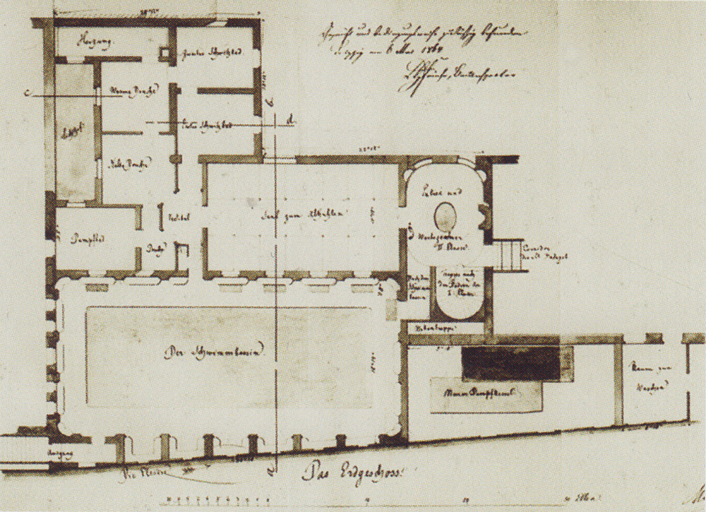 Erdgeschoss-Grundriss des Sophienbades in Leipzig